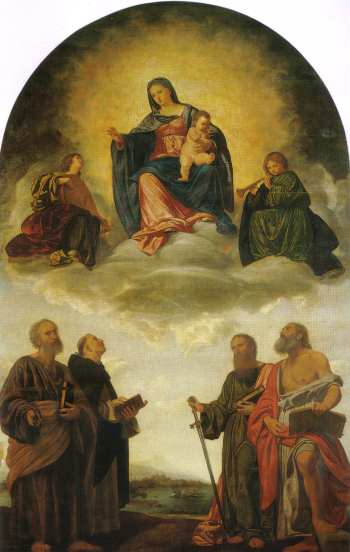 SAVOLDO, Giovanni Girolamo Pala di Pesaro